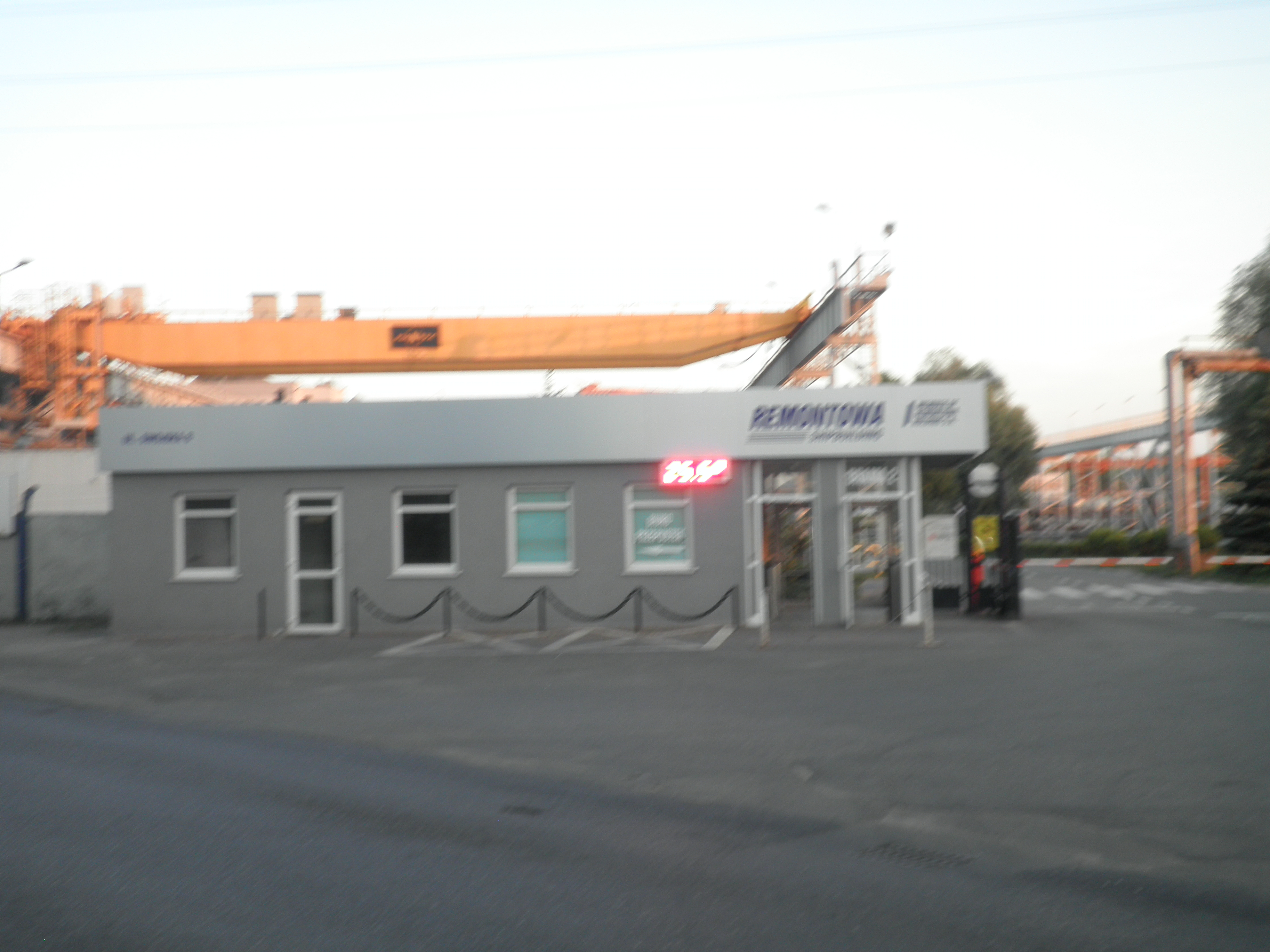 Remontowa Shipbuilding